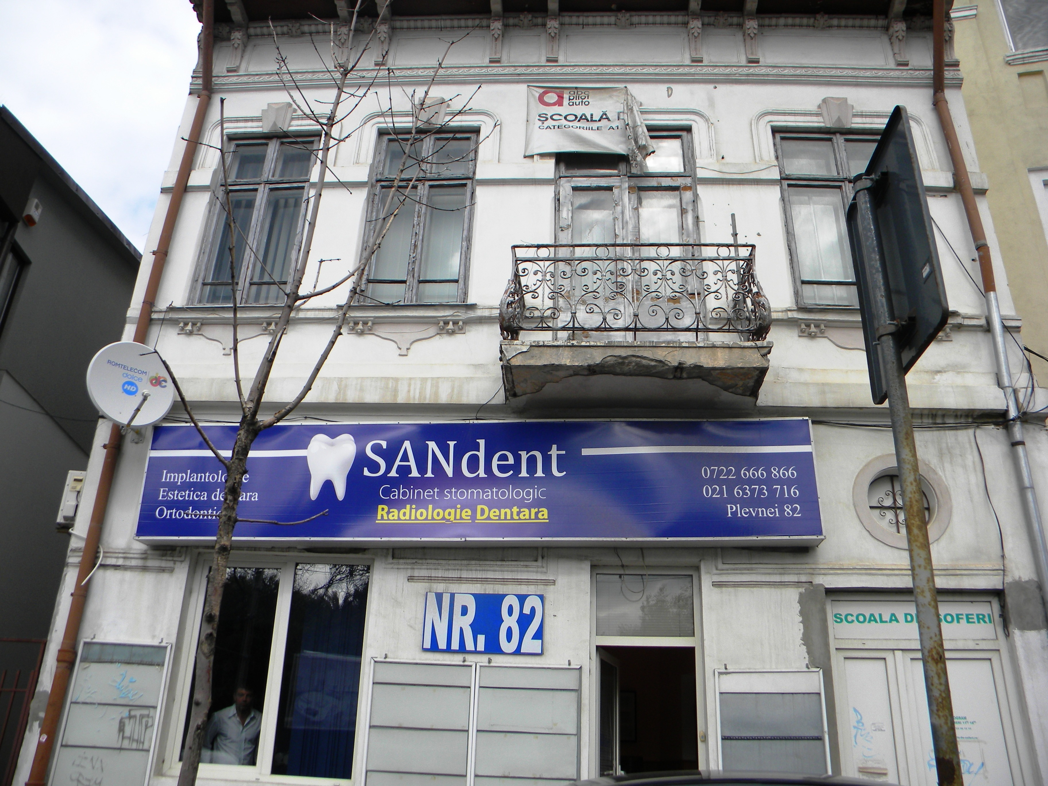 Bucuresti, Romania, Casa pe Calea Plevnei nr. 82, sect. 1